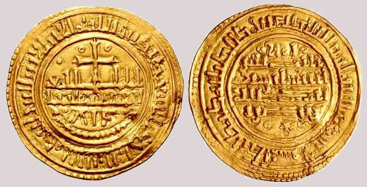 Spanische Gold-Münze: Maravedí, Toledo, Alfons VIII. (Kastilien)